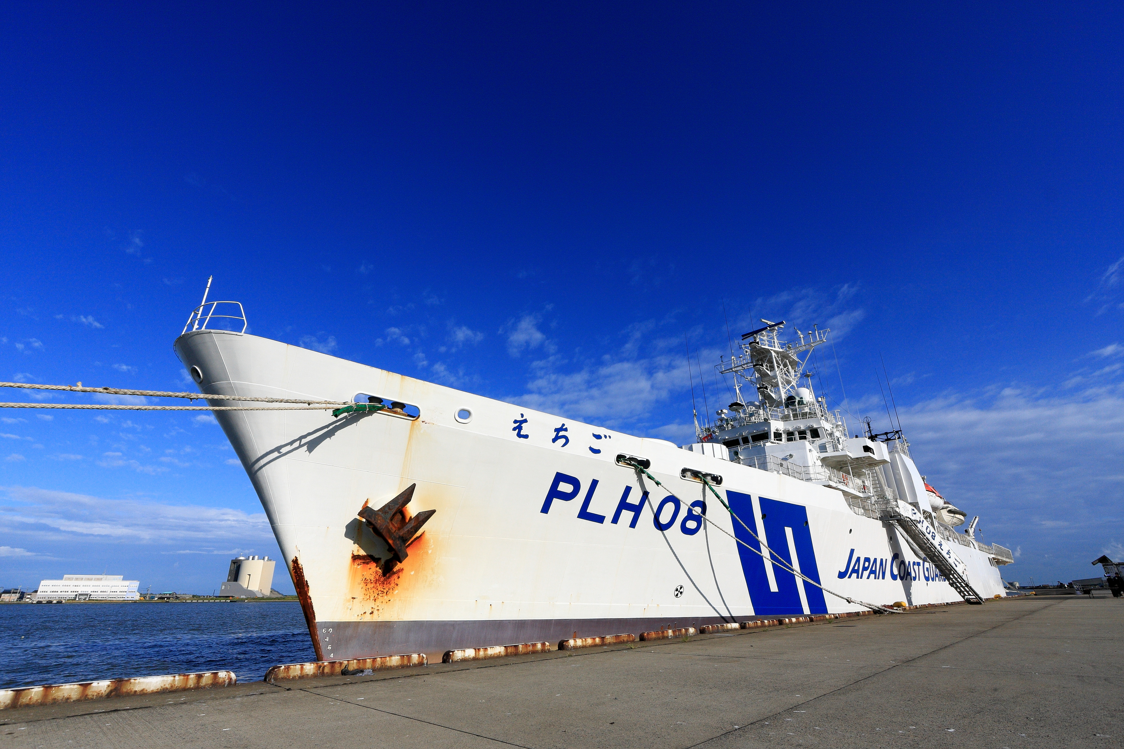 新潟港で撮影された、海上保安庁第九管区海上保安本部のPLH08えちご